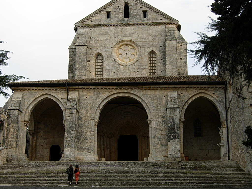 Abbazia di Casamari (FR) Foto personale concessa in PD